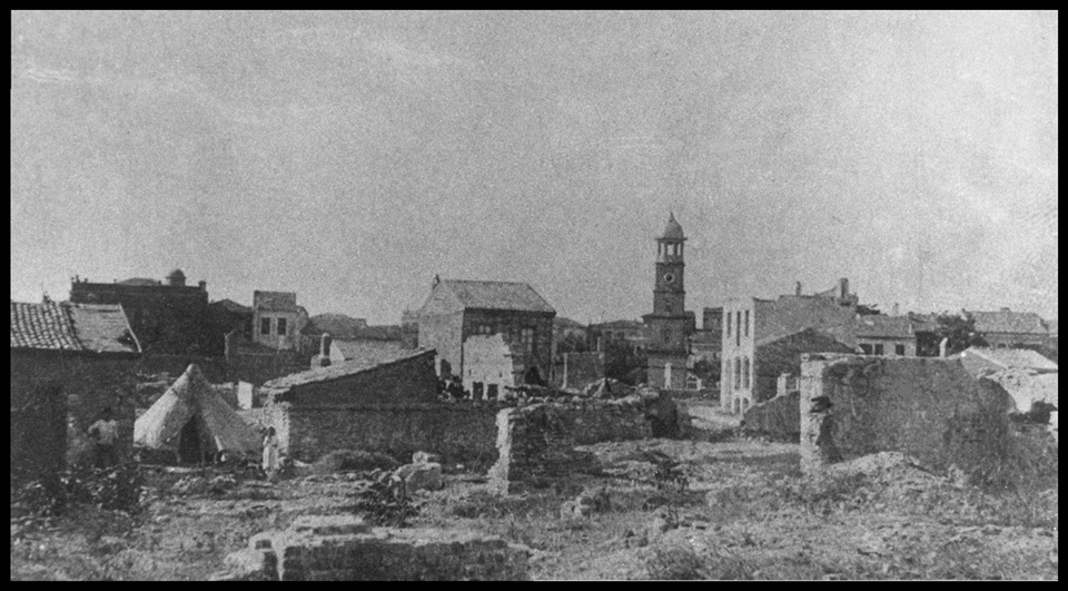 türkçe